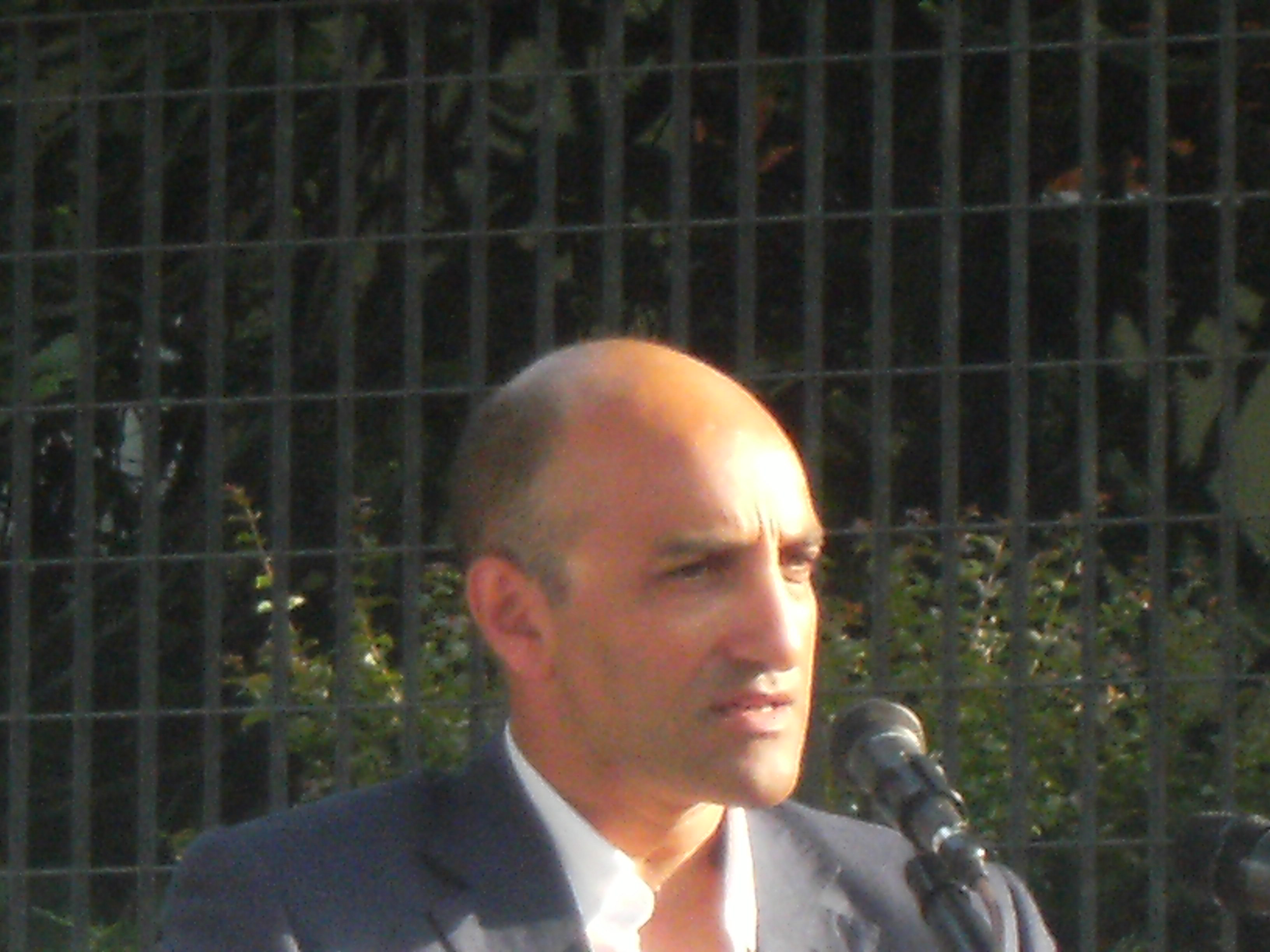 Presentazione coach Francesco Vitucci Felice Scandone Basket Avellino.